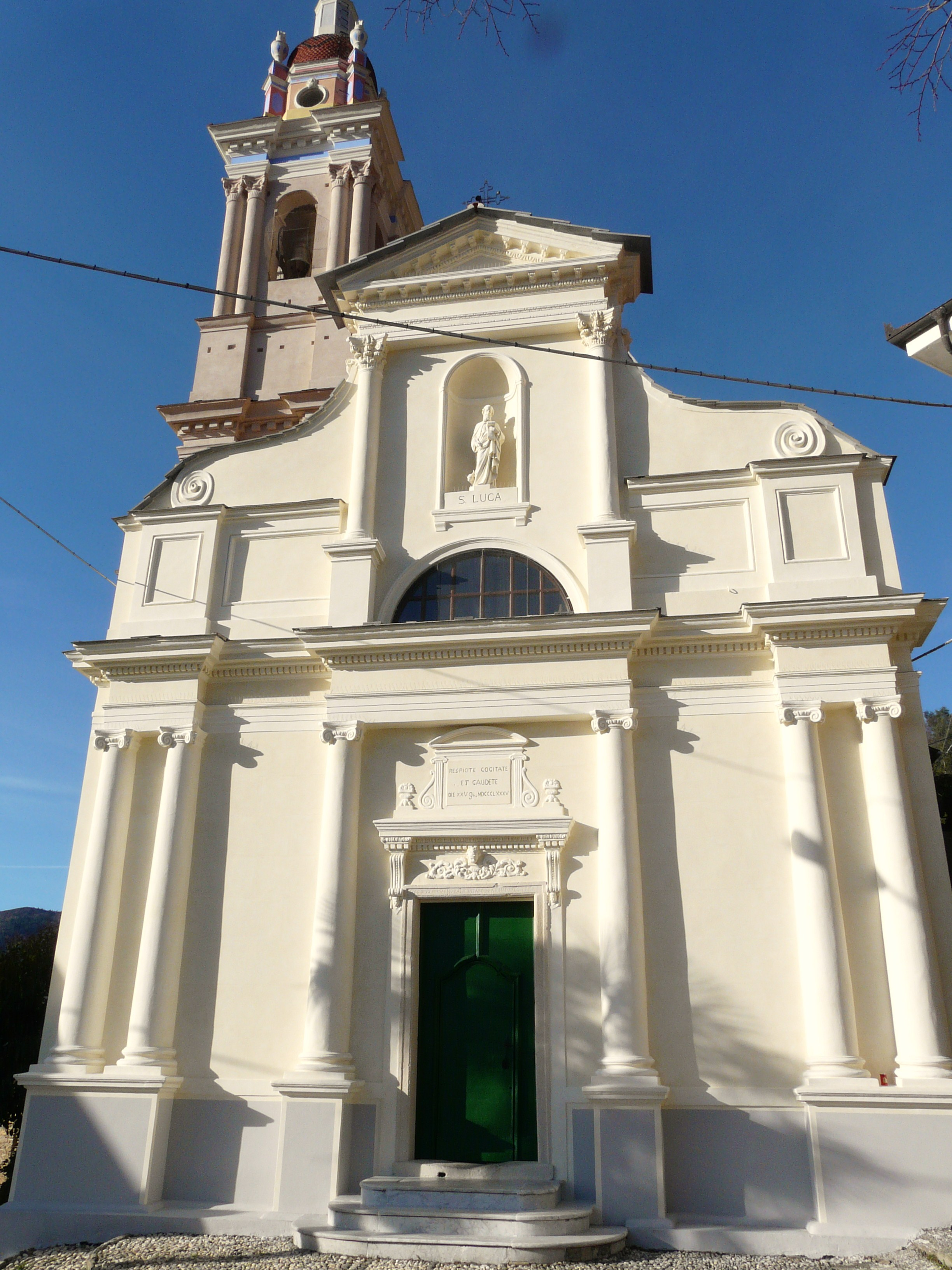 Santuario di Nostra Signora della Visitazione, Casanova Lerrone, Liguria, Italia